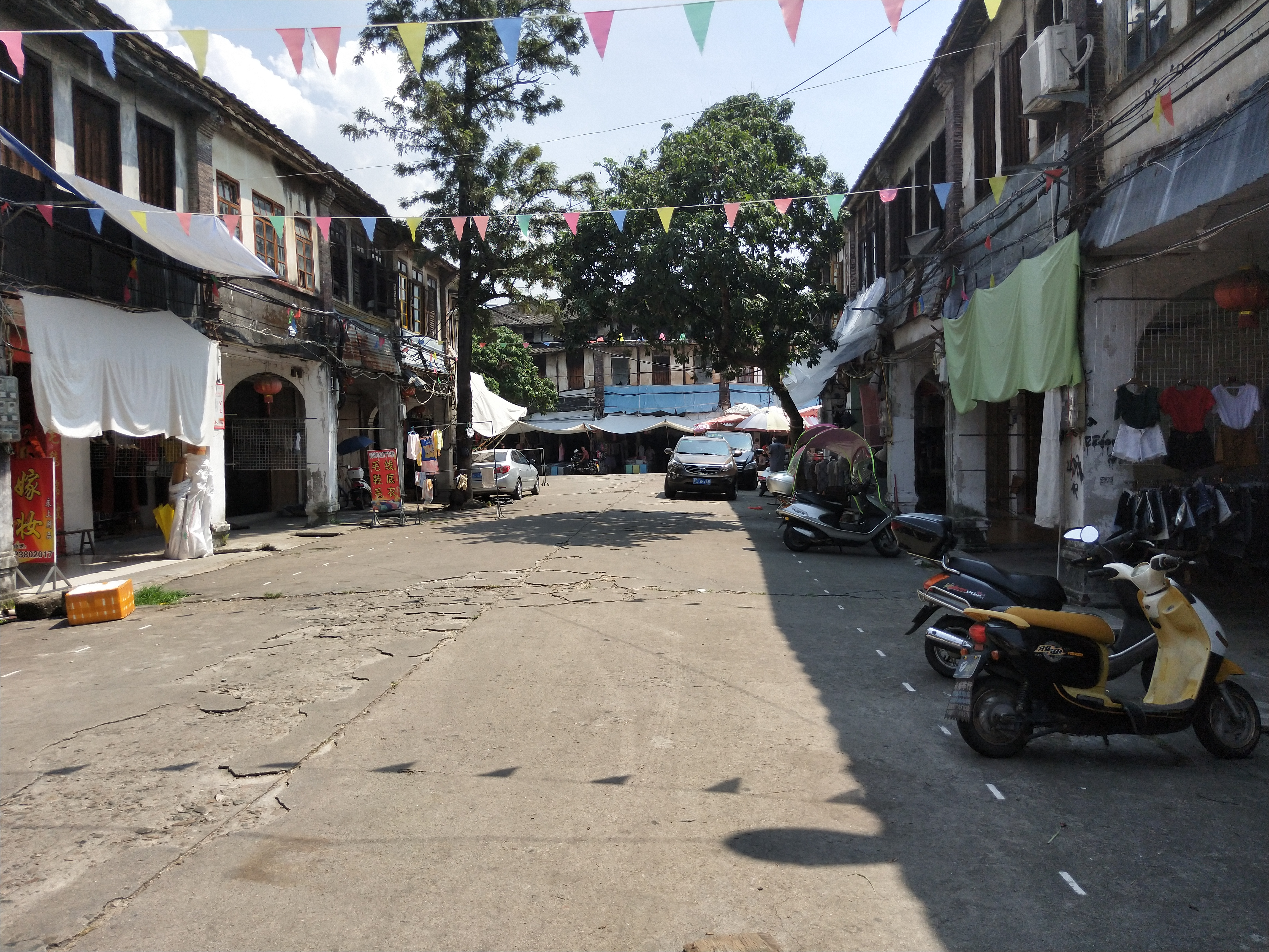 中文（中国大陆）: 蓬壶镇古街